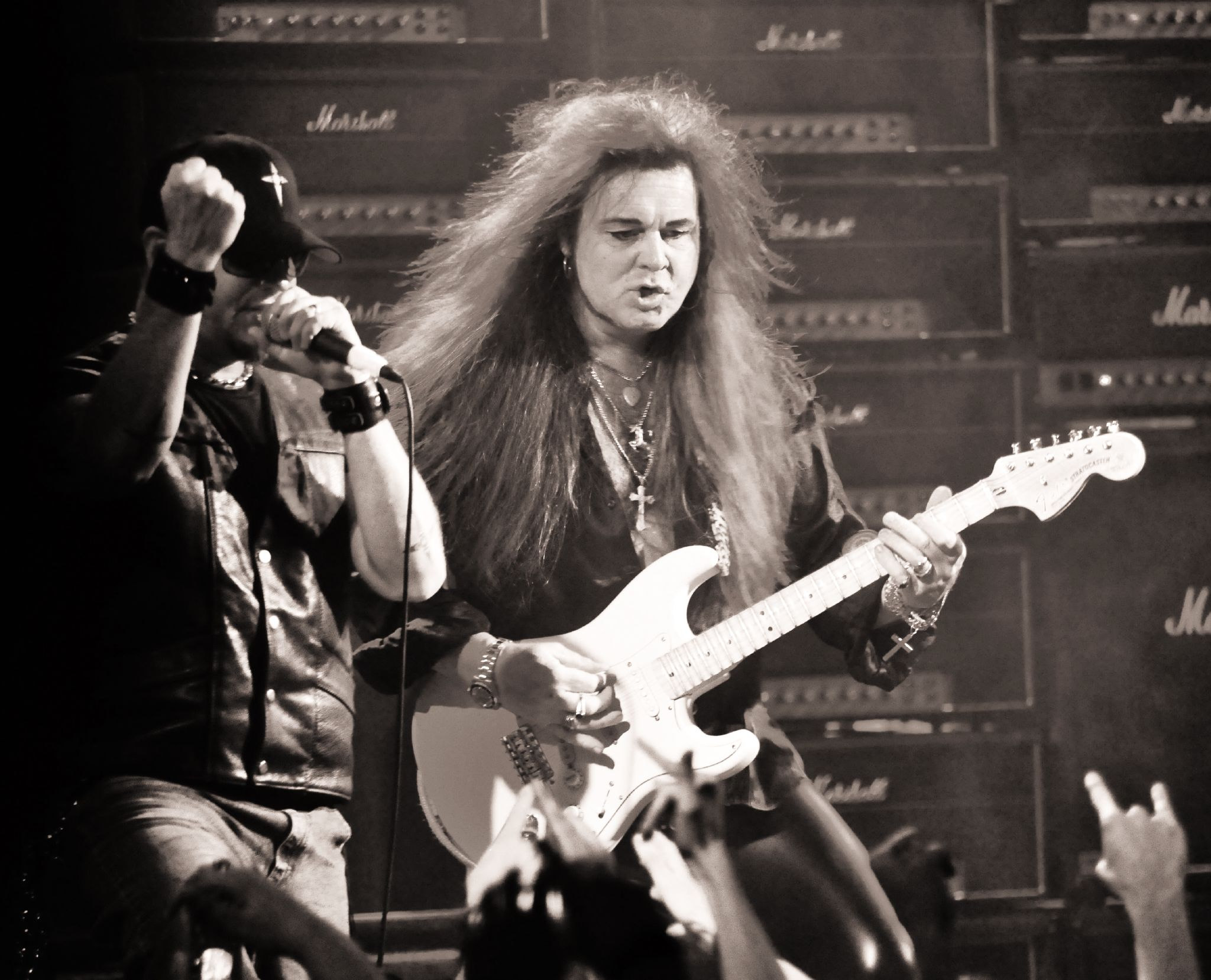 Concierto de Yngwie Malmsteen en la sala Apolo de Barcelona